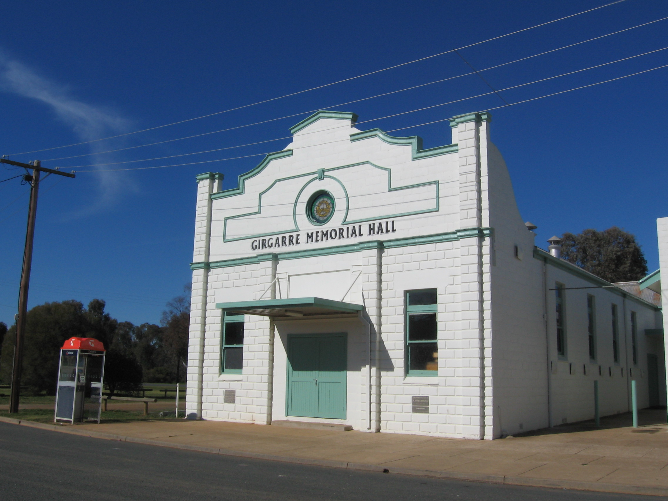 Memorial Hall at Girgarre, Victoria